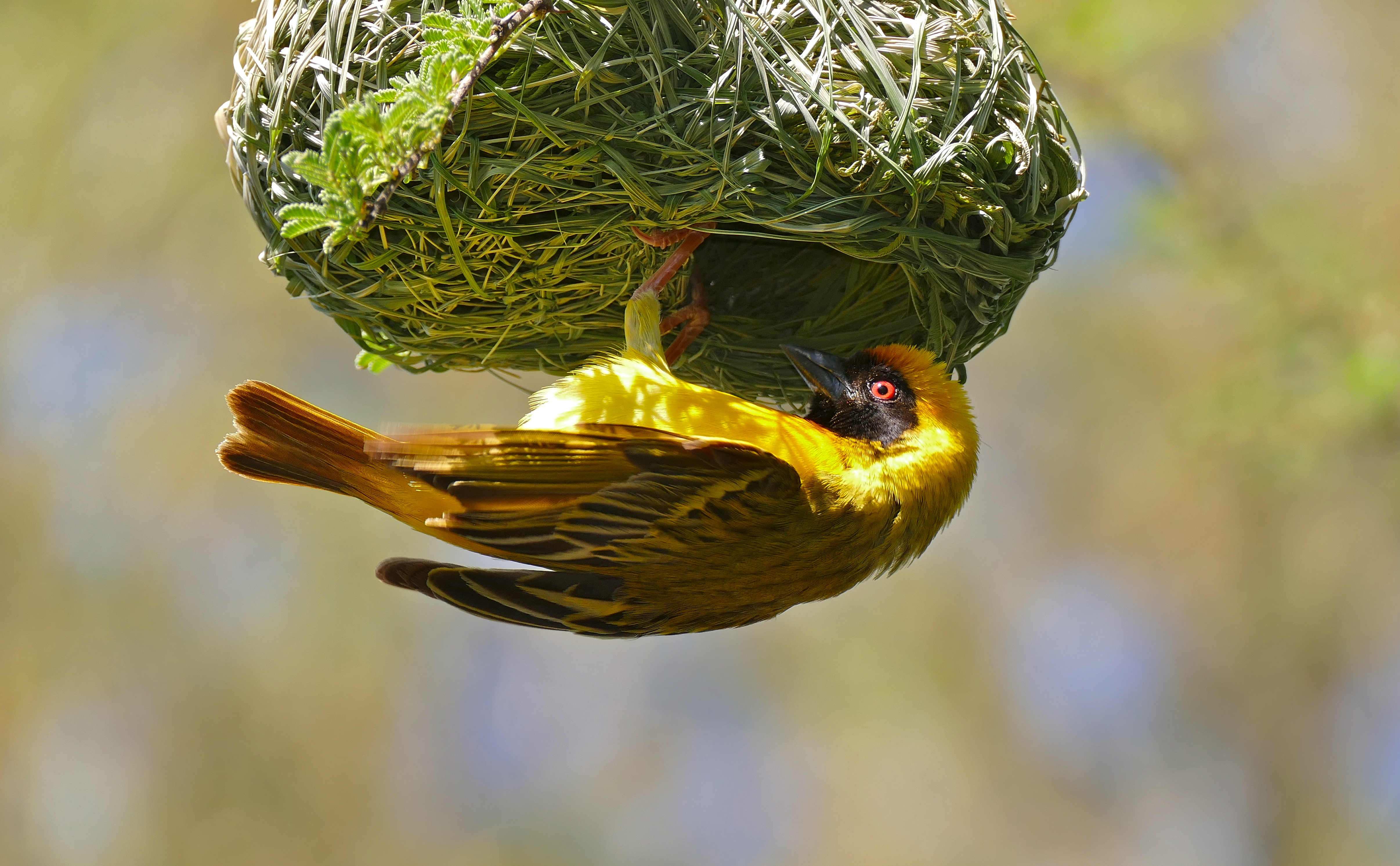 Lower Sabie Camp, Kruger NP, SOUTH AFRICA